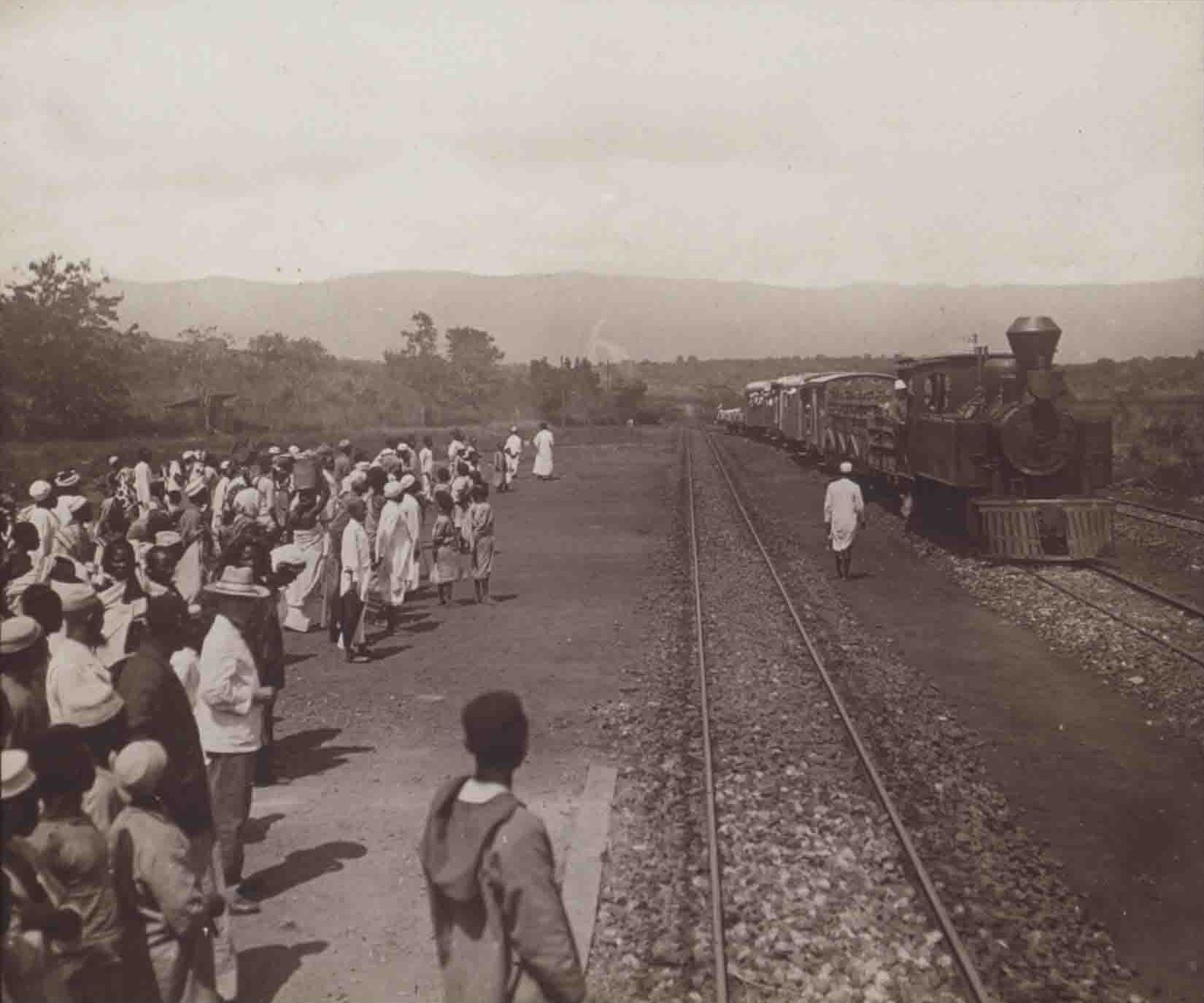 Ein Zug im Bahnhof Usambara, Deutsch Afrika, heute Tansania Standort: 1998/digi Bildnummer: 072-1998-064 CD-Code: CD/7222/2012/0991/7222_2012_0991_0014 Text auf dem Bild: 256. Dernburg-Reise 265 Usambarabahn Format Bildträger: 8,5 x 8,5 Entstehungsjahr: 1907 Photograph: Camera-Fabrik Ica Region: / Afrika, Ostafrika, Tansania, Usambara/ Afrika, Deutsch Afrika, DOA